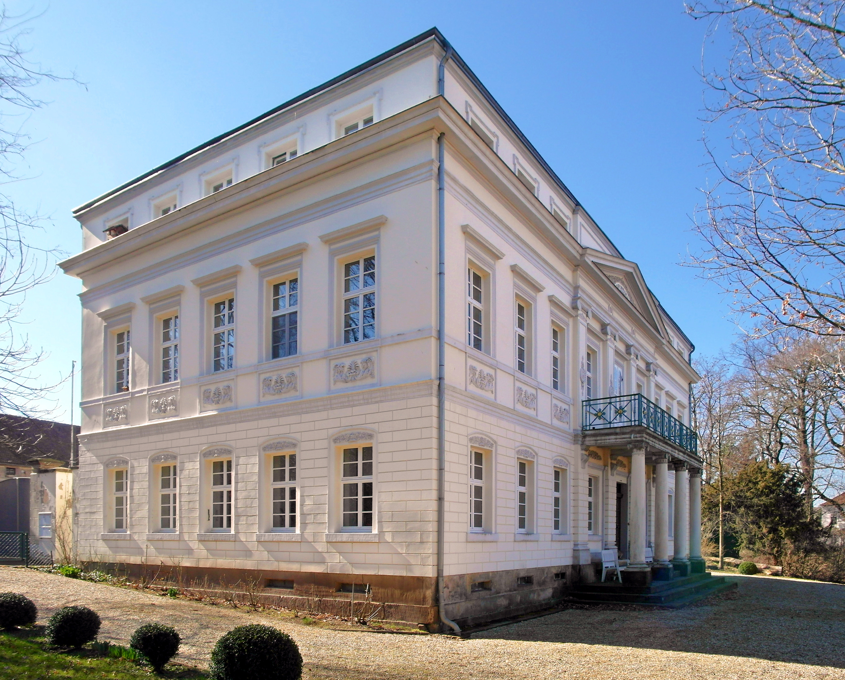 27.03.2017 02799 Großschönau, Hauptstraße 52: Rittergut Großschönau. Klassizistisches Herrenhaus, 1834 für Johann Gottfried Haebler errichtet. Privatbesitz. Sicht von Südosten. [SAM8989.JPG]20170327380DR.JPG(c)Blobelt